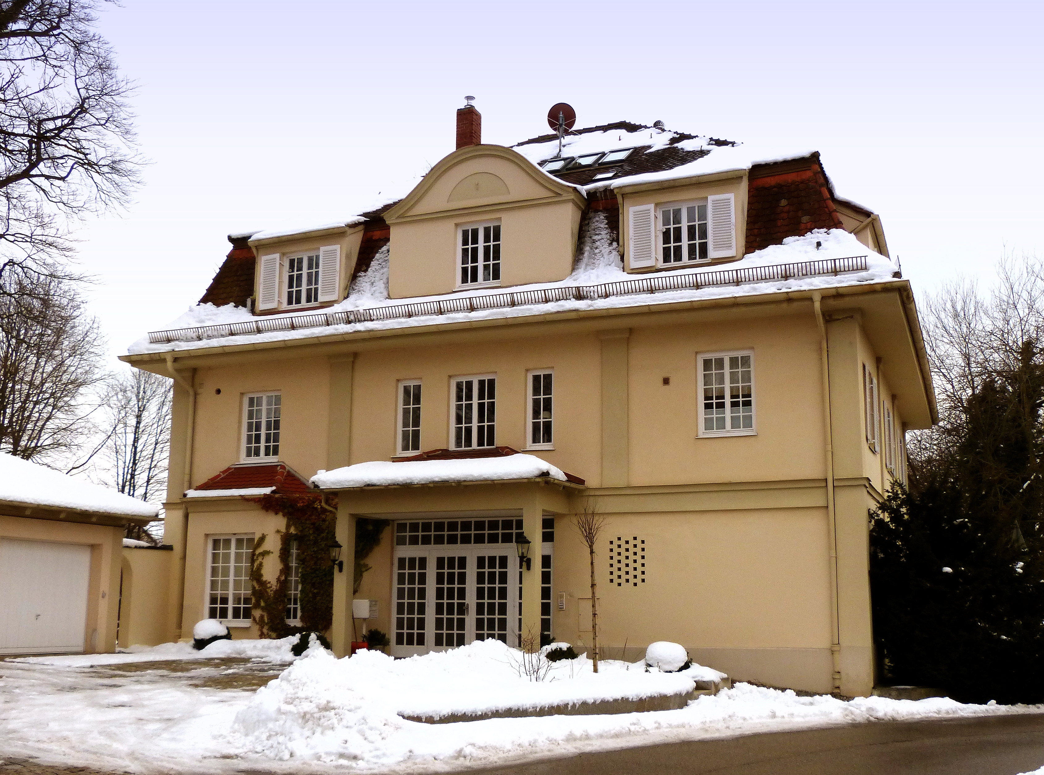 Feldafing, Dr.-Appelhans-Weg 2, Villa Bonn. Der zweigeschossige Mansarddachbau im Reformstil mit Gauben und Putzbänderung wurde 1914 erbaut.